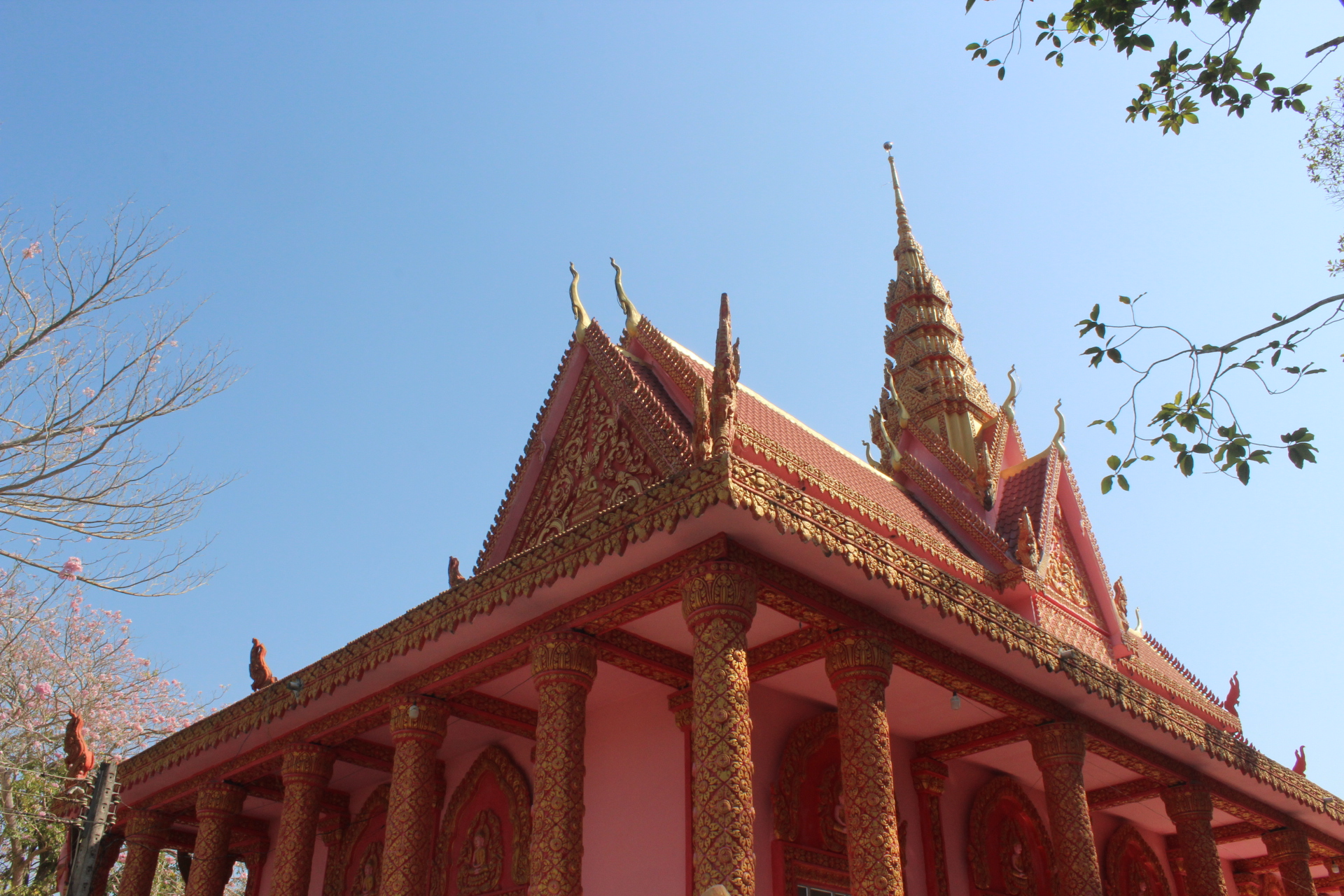 Công trình sala chùa Pô Thi Thlâng xã Thới An Hội